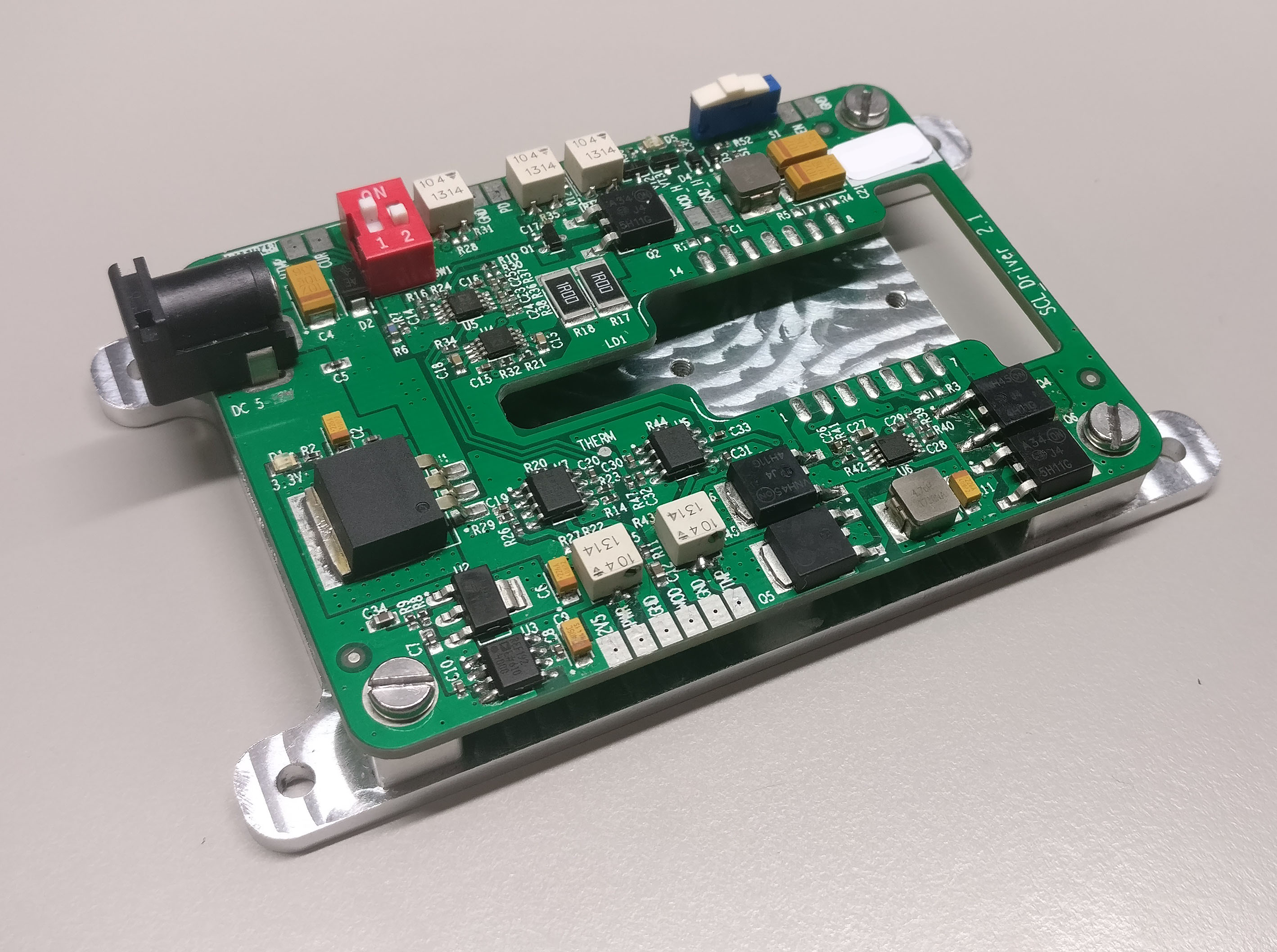 Драйвер лазерного диода